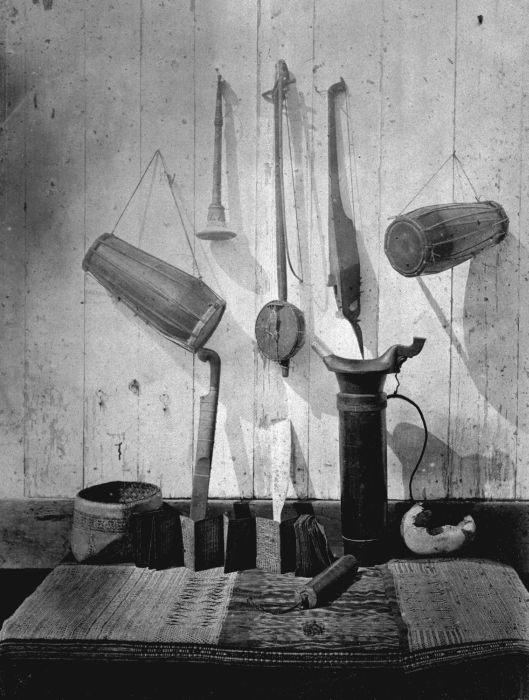 Foto. Een verzameling Karo Batak objecten, waaronder muziekinstrumenten, een mand, een zwaard, een wichelboek, een palmwijnkoker en een aantal doeken